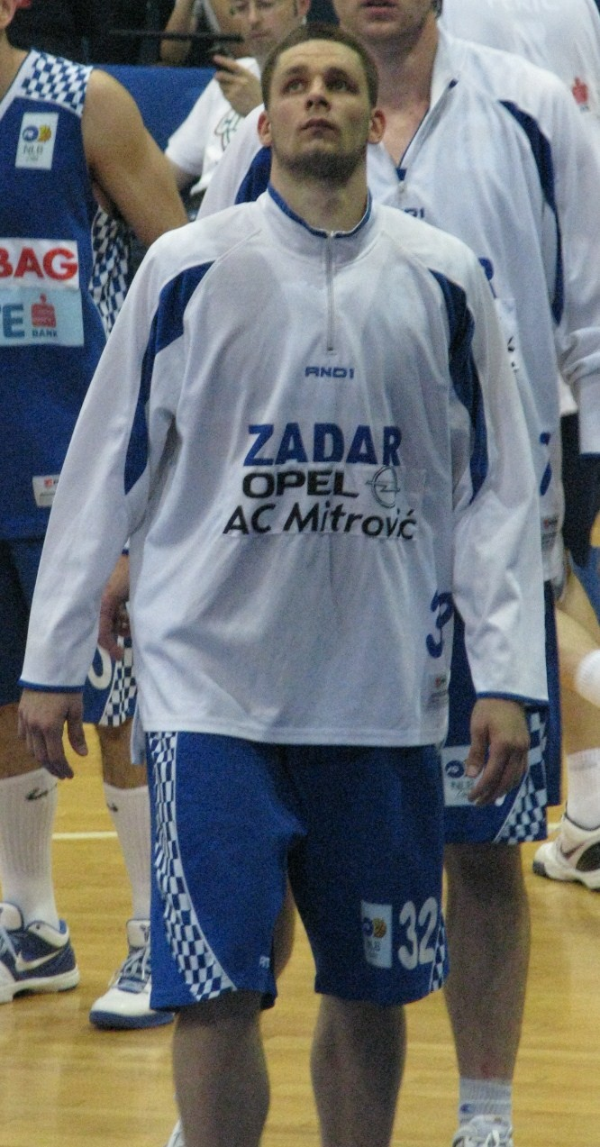 Marko Car